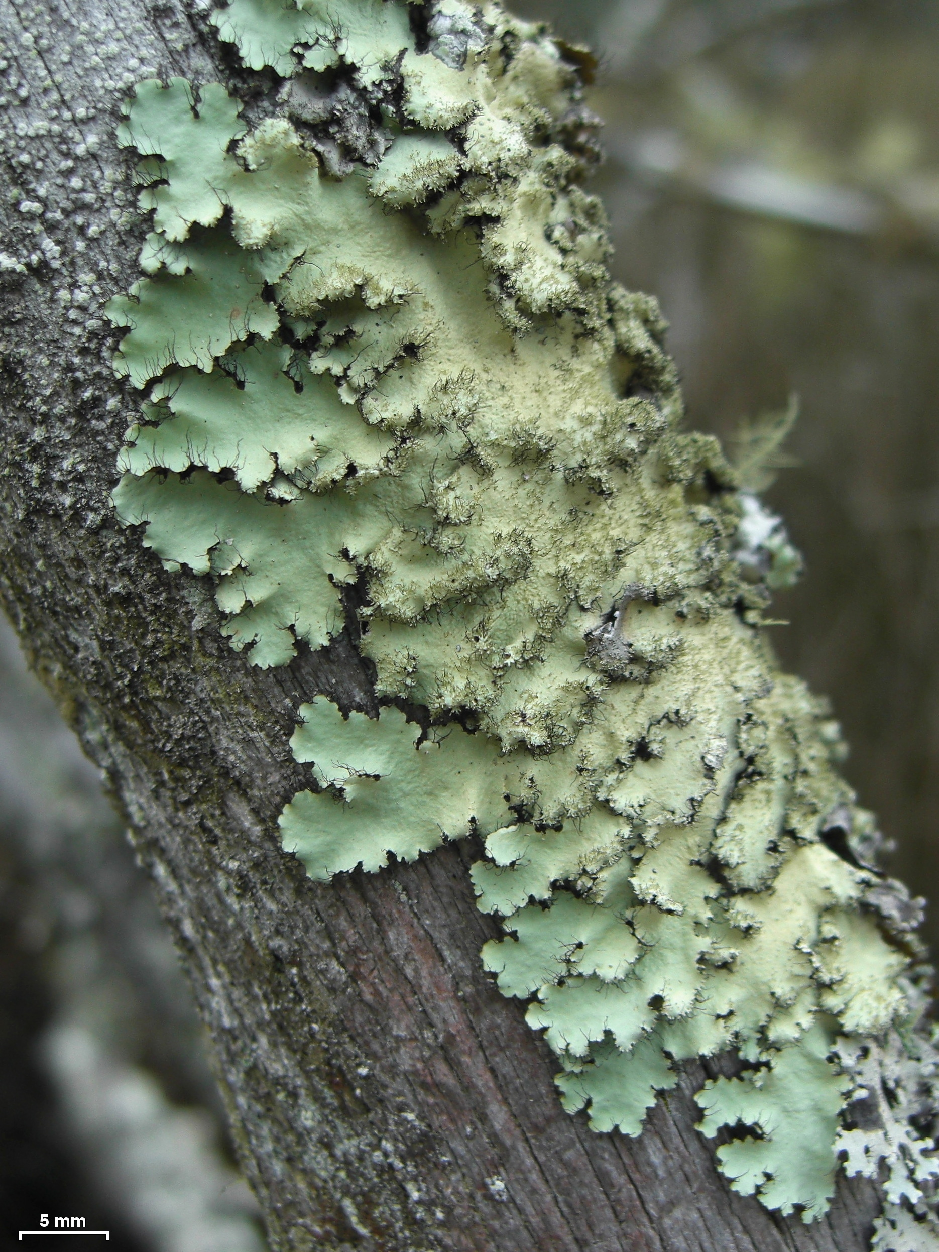 Georgia coast, 20131215